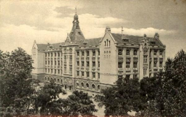 Mathildenschule 1913 in Offenbach am Main